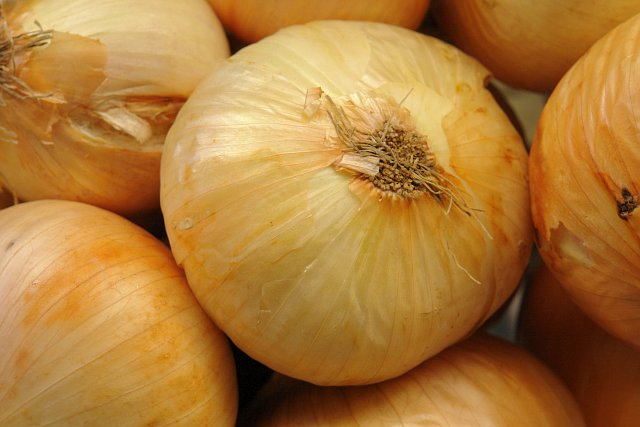 Photographer: Osvaldo Gago.